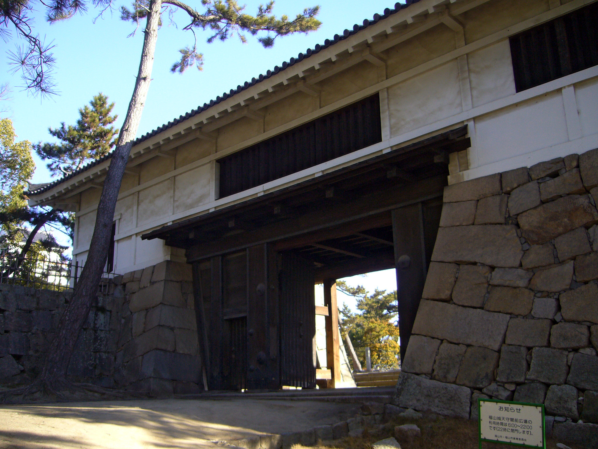 Fukuyama Castle "Sujiganegomon" in Fukuyama, Hiroshima prefecture, Japan